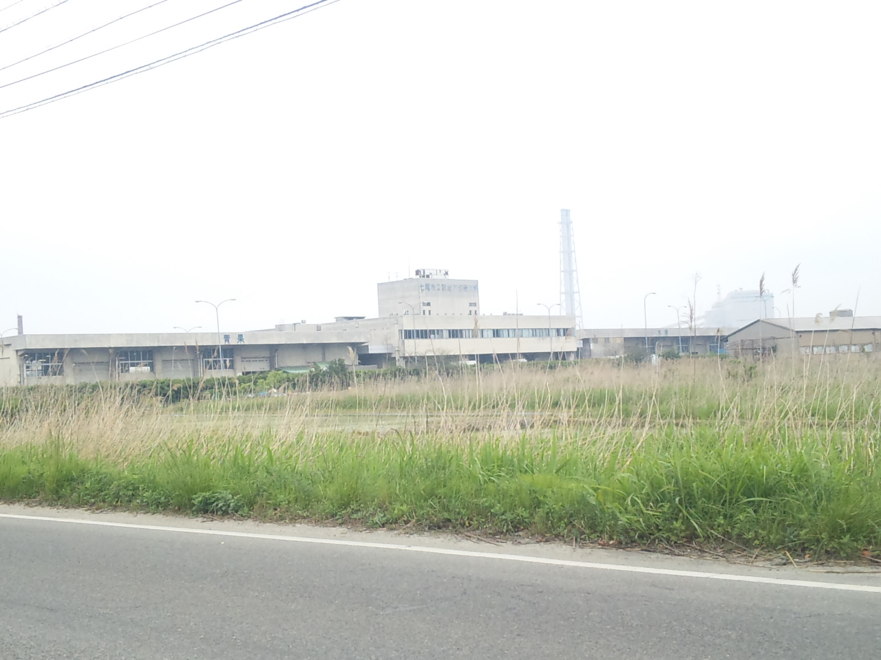 七尾市公設卸売市場